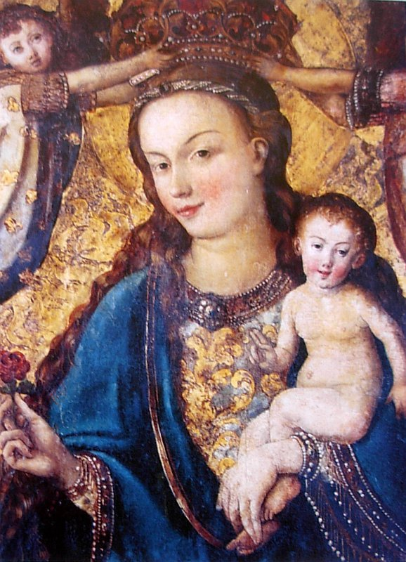 Obraz Matki Boskiej Pięknej Miłości (XV w.) słynący łaskami w ołtarzu głównym Katedry w Bydgoszczy